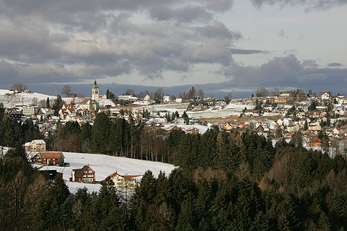 Speicher